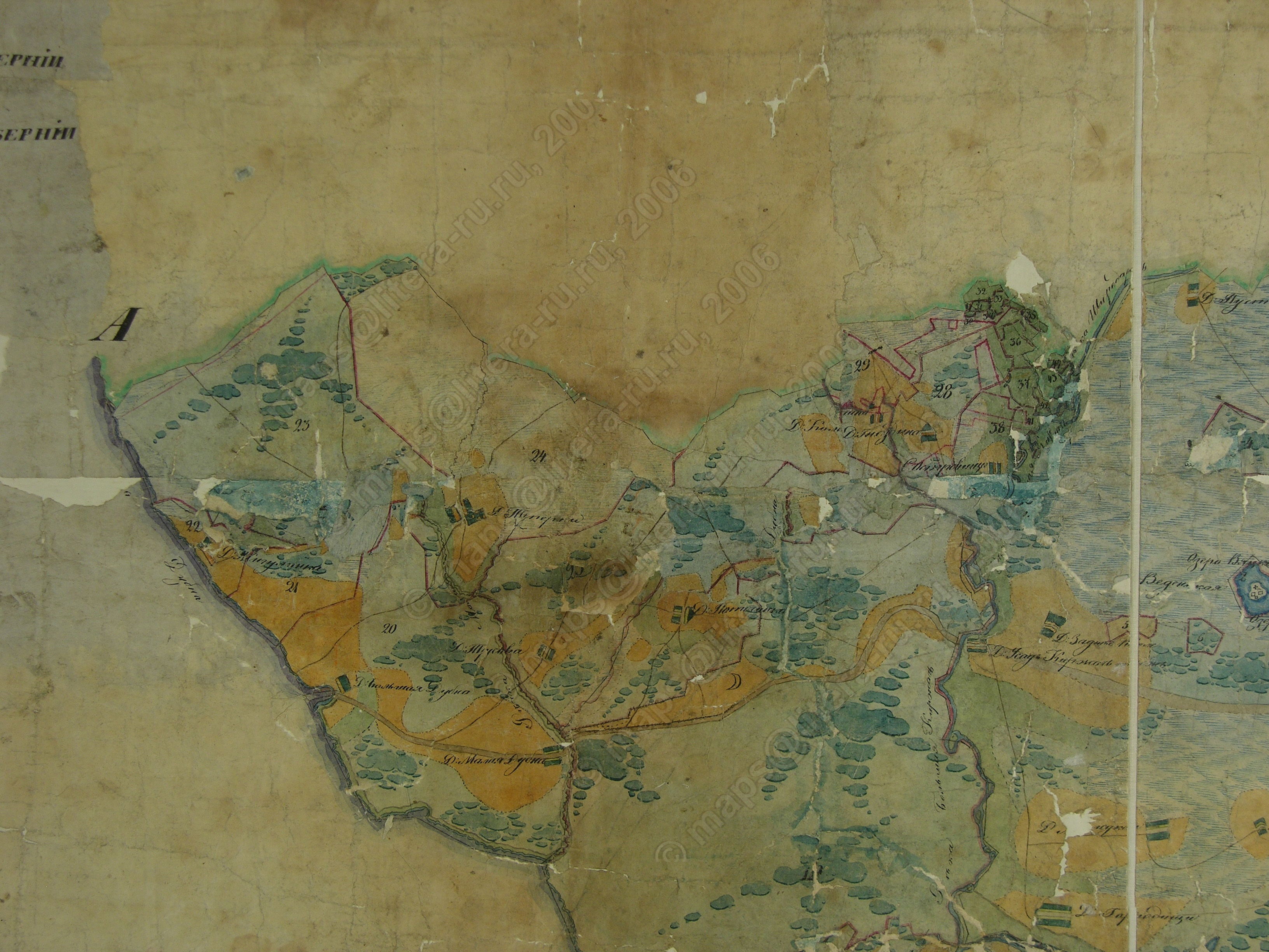 Карта Покровского уезда (ПГМ 1 верста) 1780 - 1790 гг